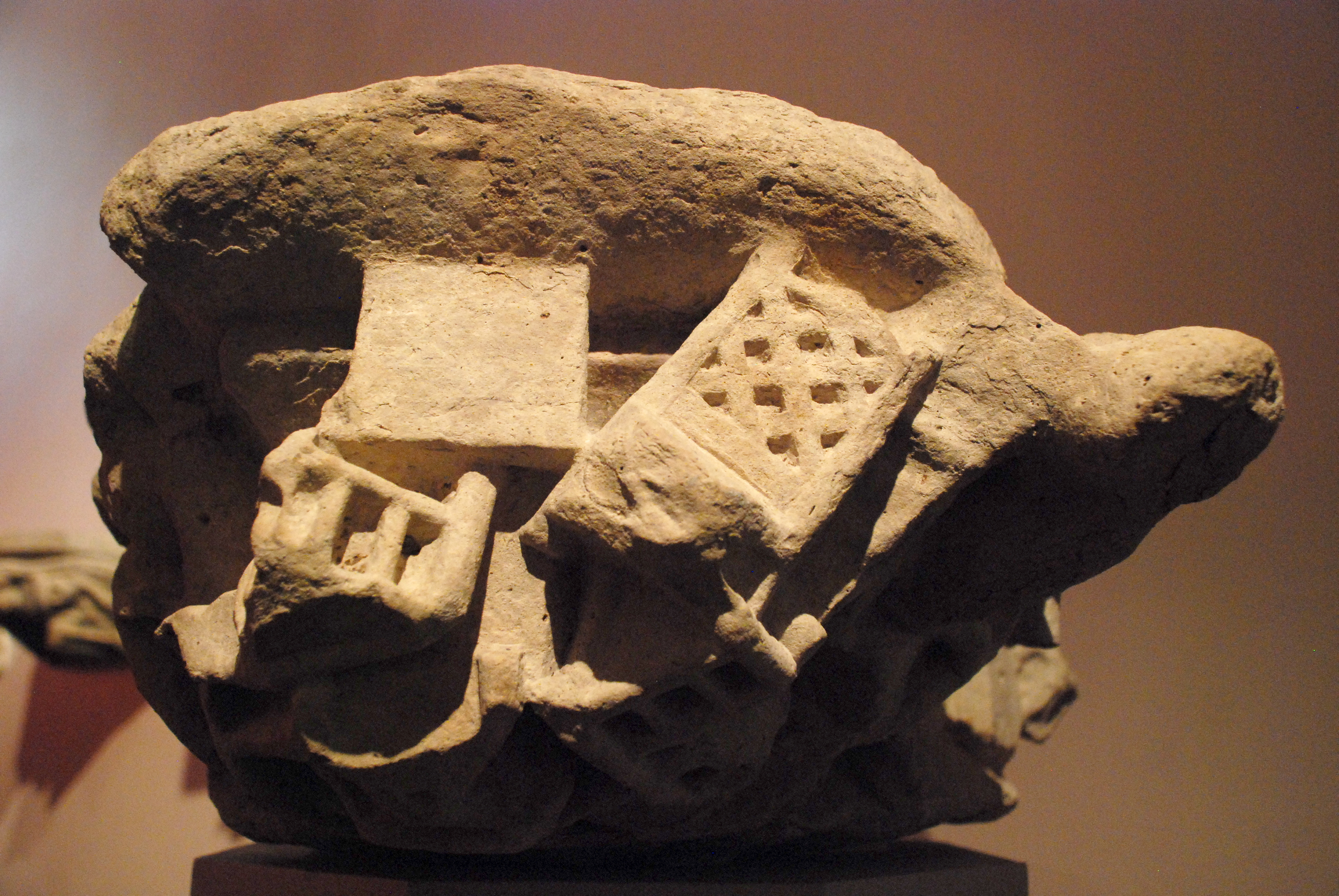 Belgique - Bruxelles - Hôtel de Ville - original du chapiteau de la Maison de l'Estrapade intégrée à l'Hôtel de Ville (chapiteau conservé au Musée communal, dans la Maison du Roi)